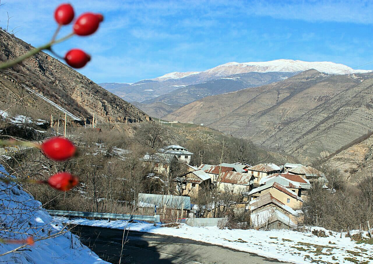 پرندان بهشت اشکور